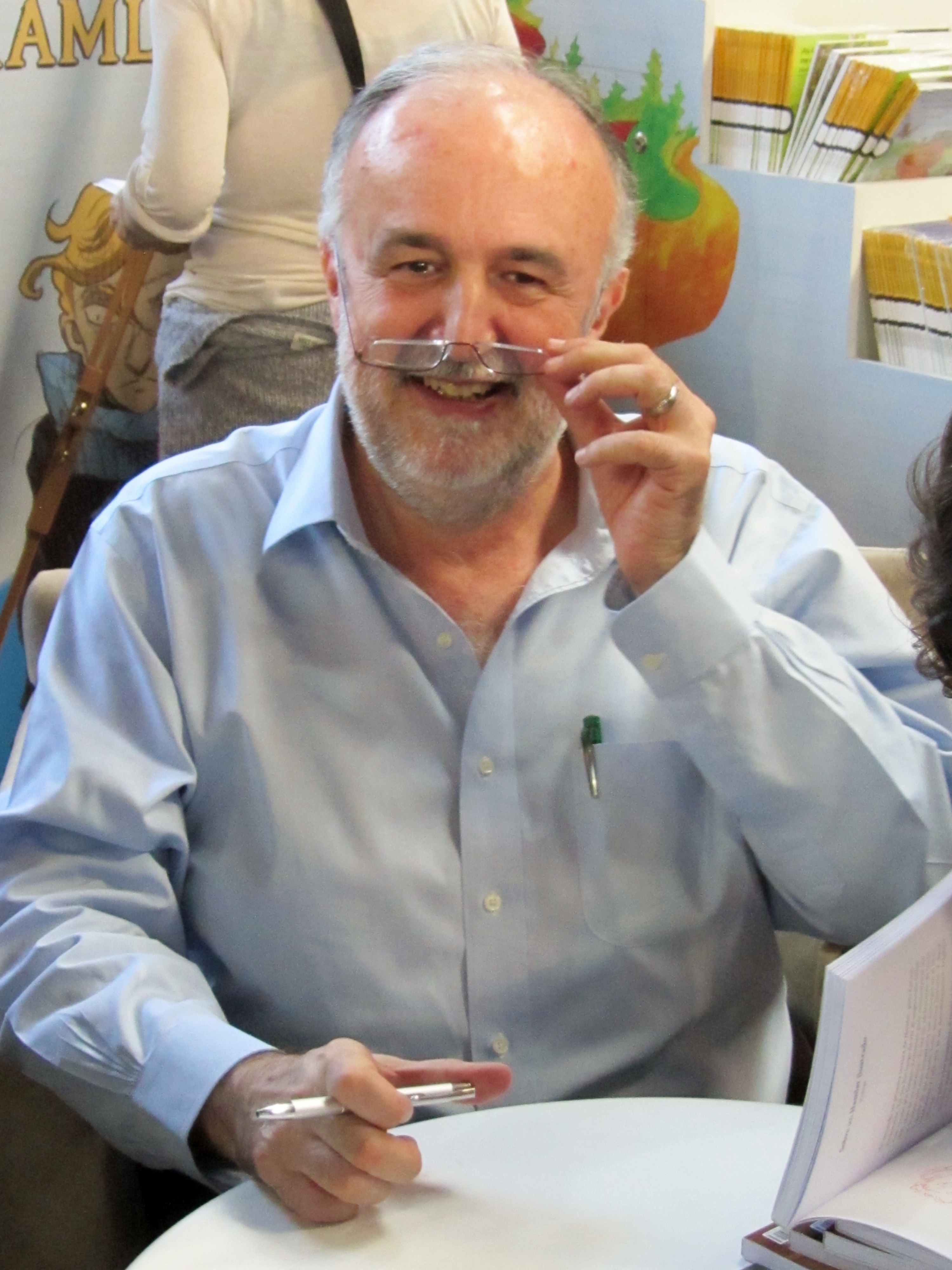 El dramaturgo chileno Marco Antonio de la Parra firma ejemplares de sa adaptación del libro Hamlet en la Feria Internacional del Libro de Santiago 2016